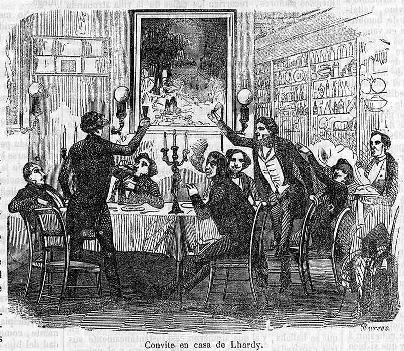 Convite en casa de Lhardy, en la revista española La Ilustración.